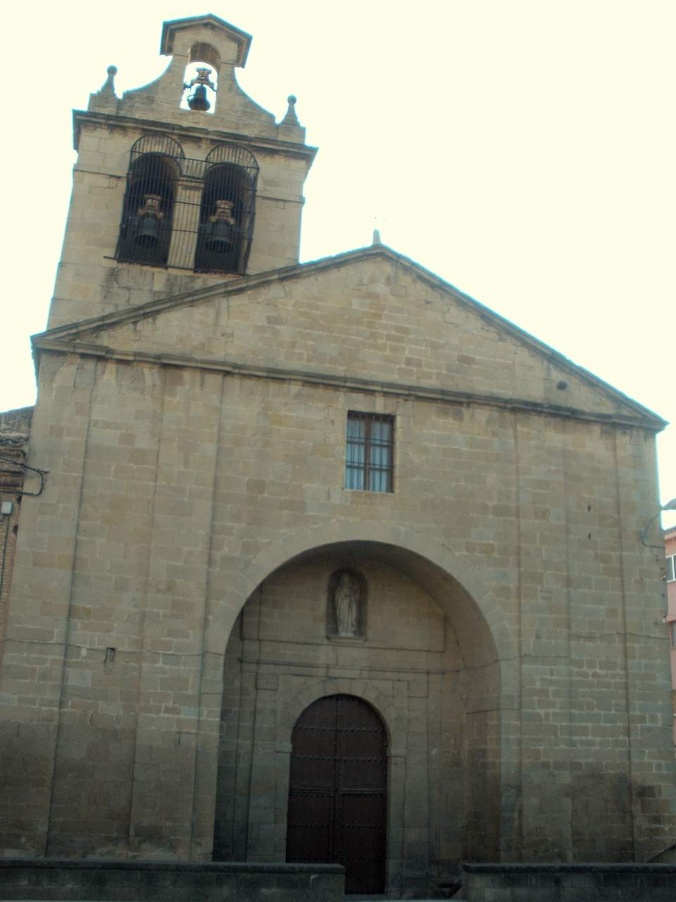 Convento de Santa Engracia (Clarisas), en Olite (Navarra)